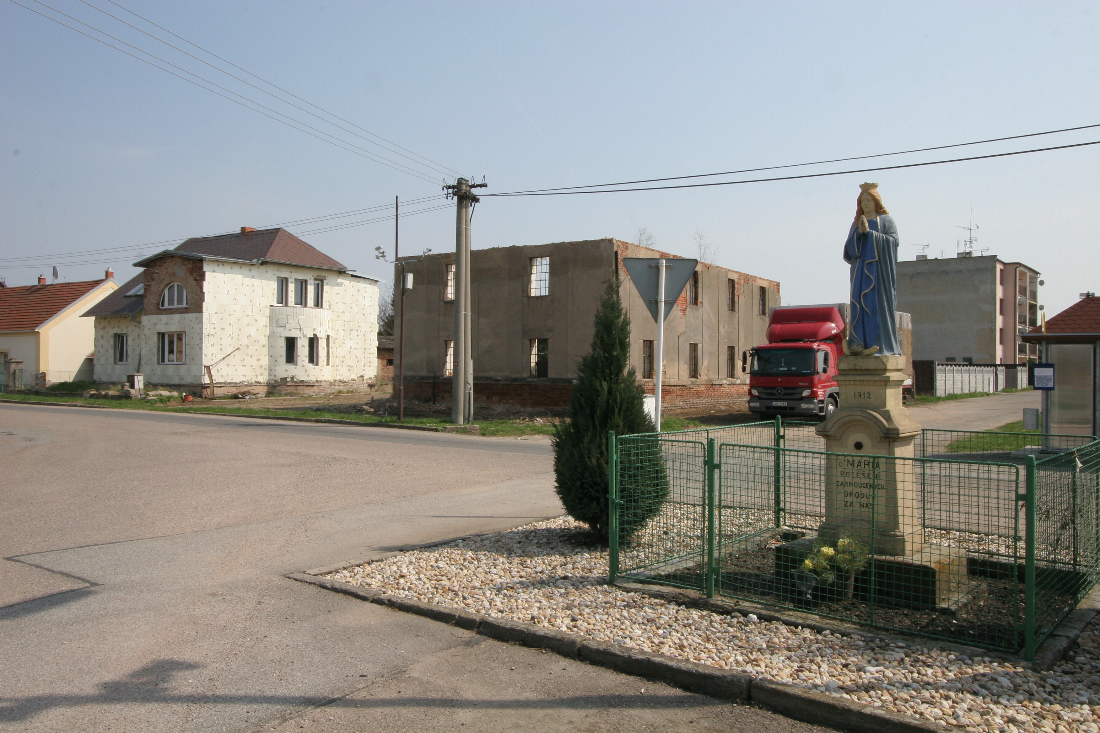 Káranice socha panny Marie